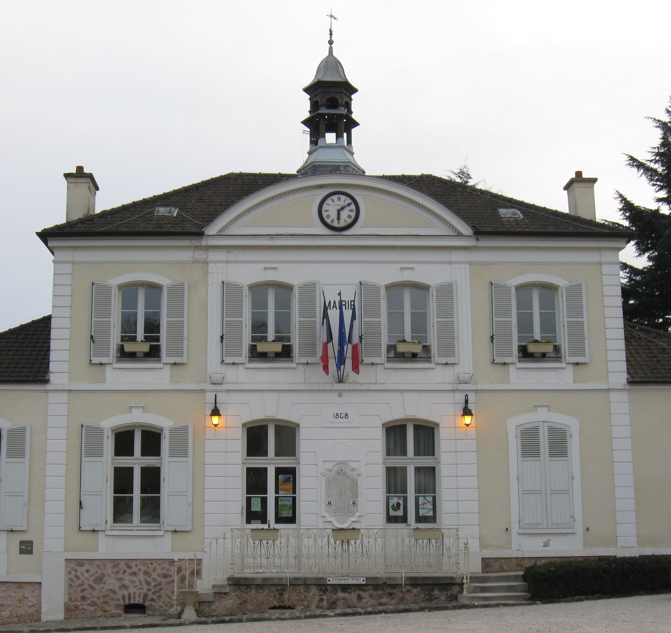 Mairie de Gouvernes. (Seine-et-Marne, région Île-de-France).